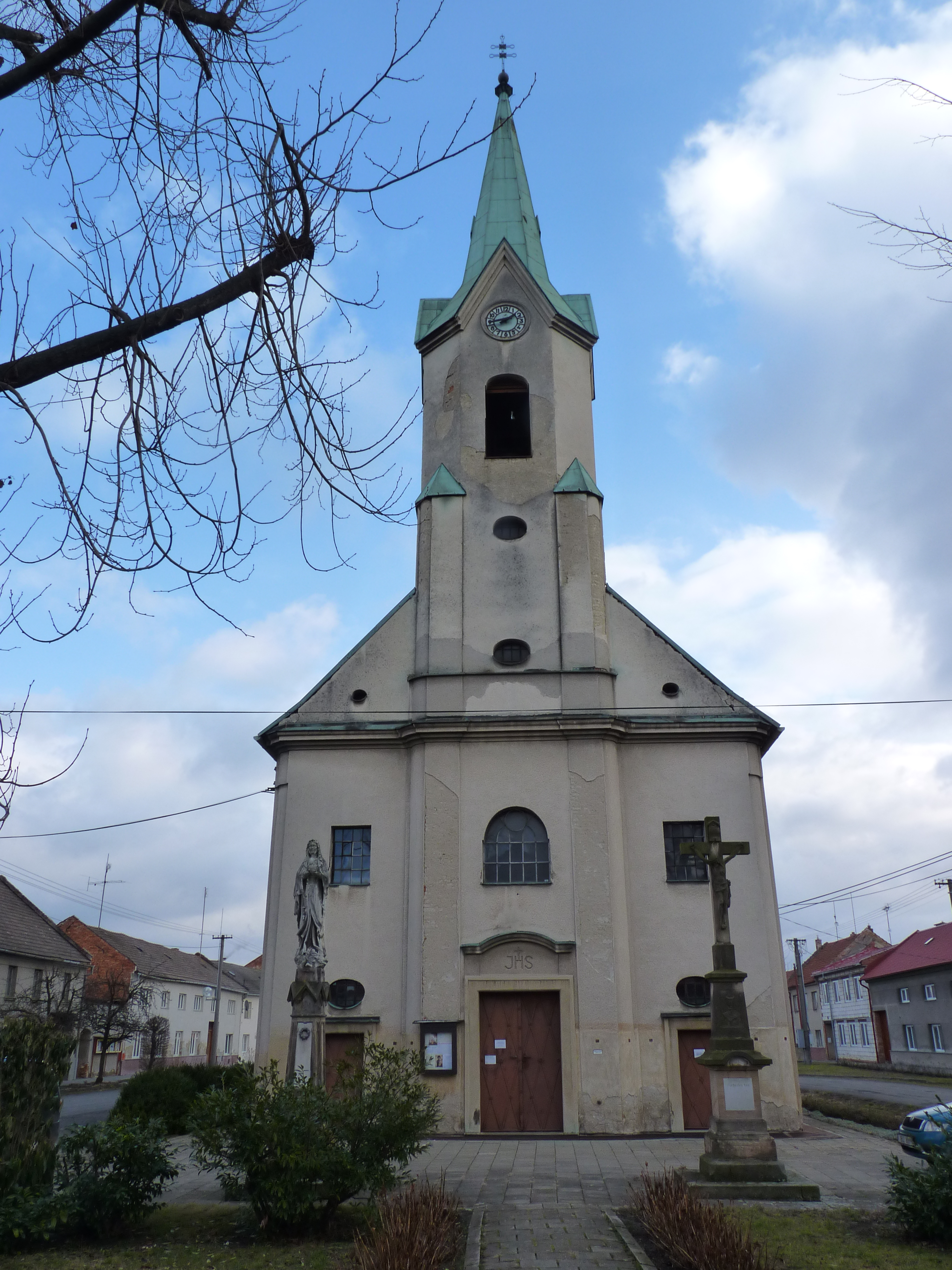 Kostel svatého Prokopa, Čehovice, okres Prostějov, náves.